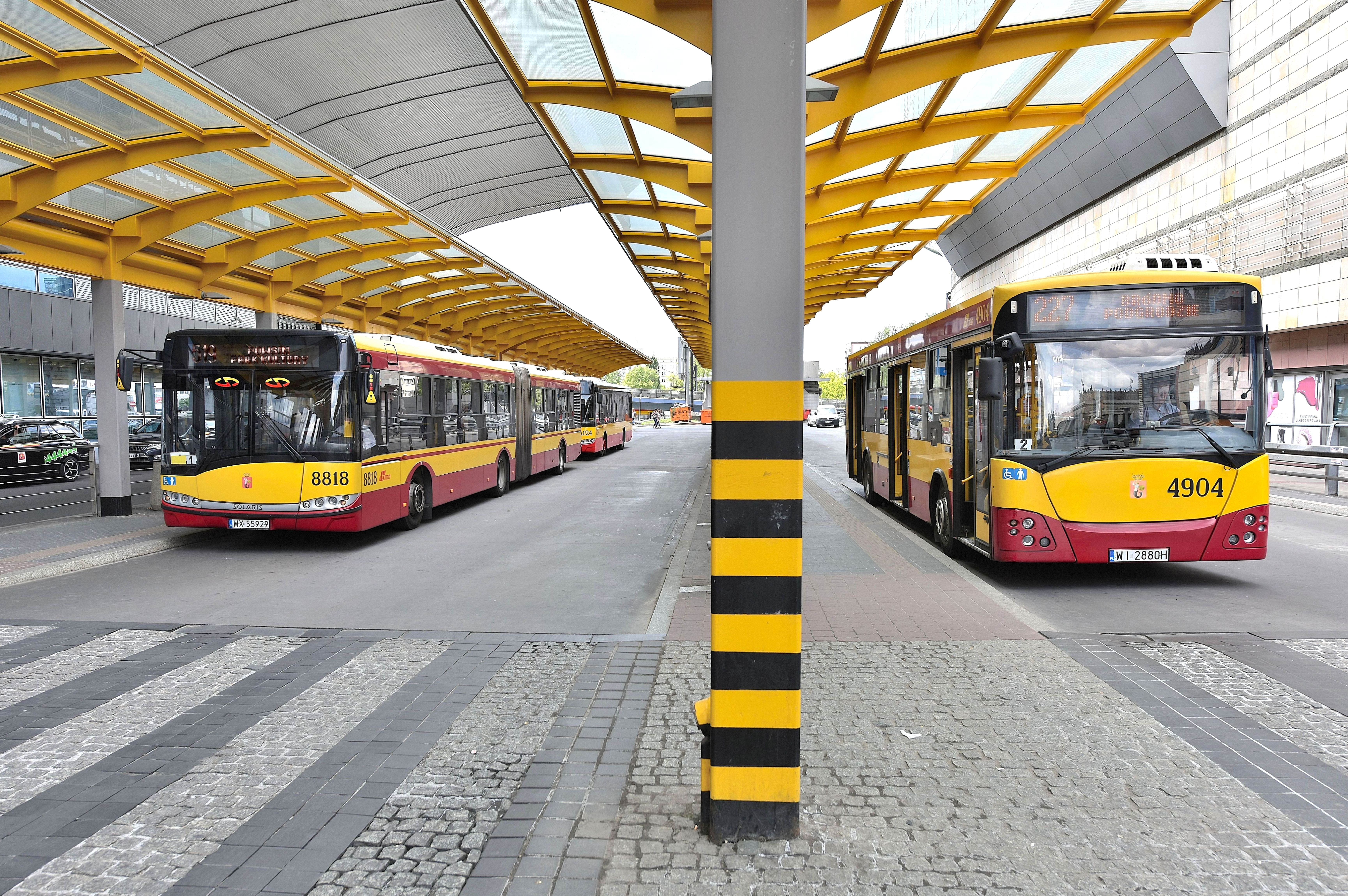 Autobusy na Dworcu Centralnym w Warszawie